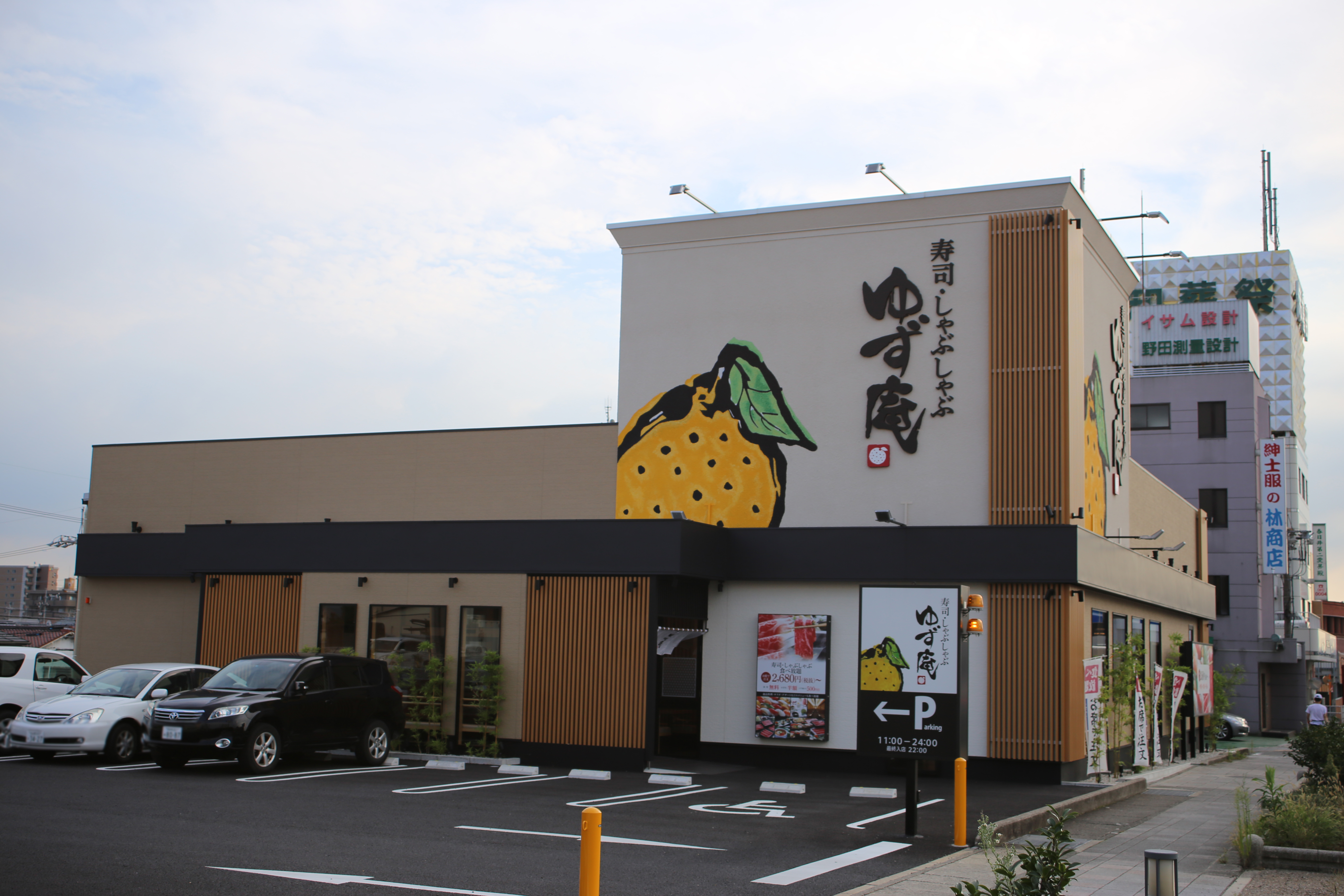 愛知県春日井市のゆず庵春日井店